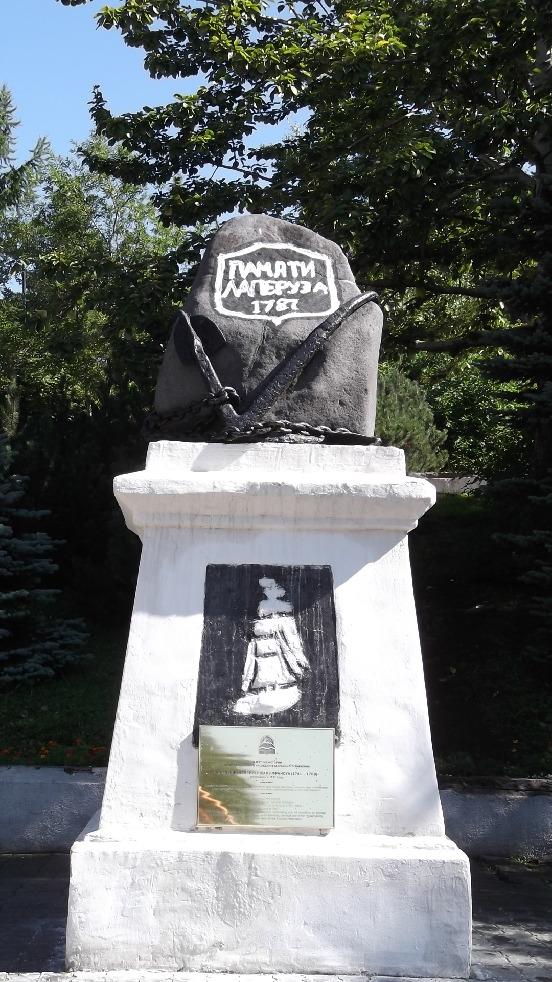 Город Петропавловск-Камчатский, аллея флота, Памятник Лаперузу (1787 год)